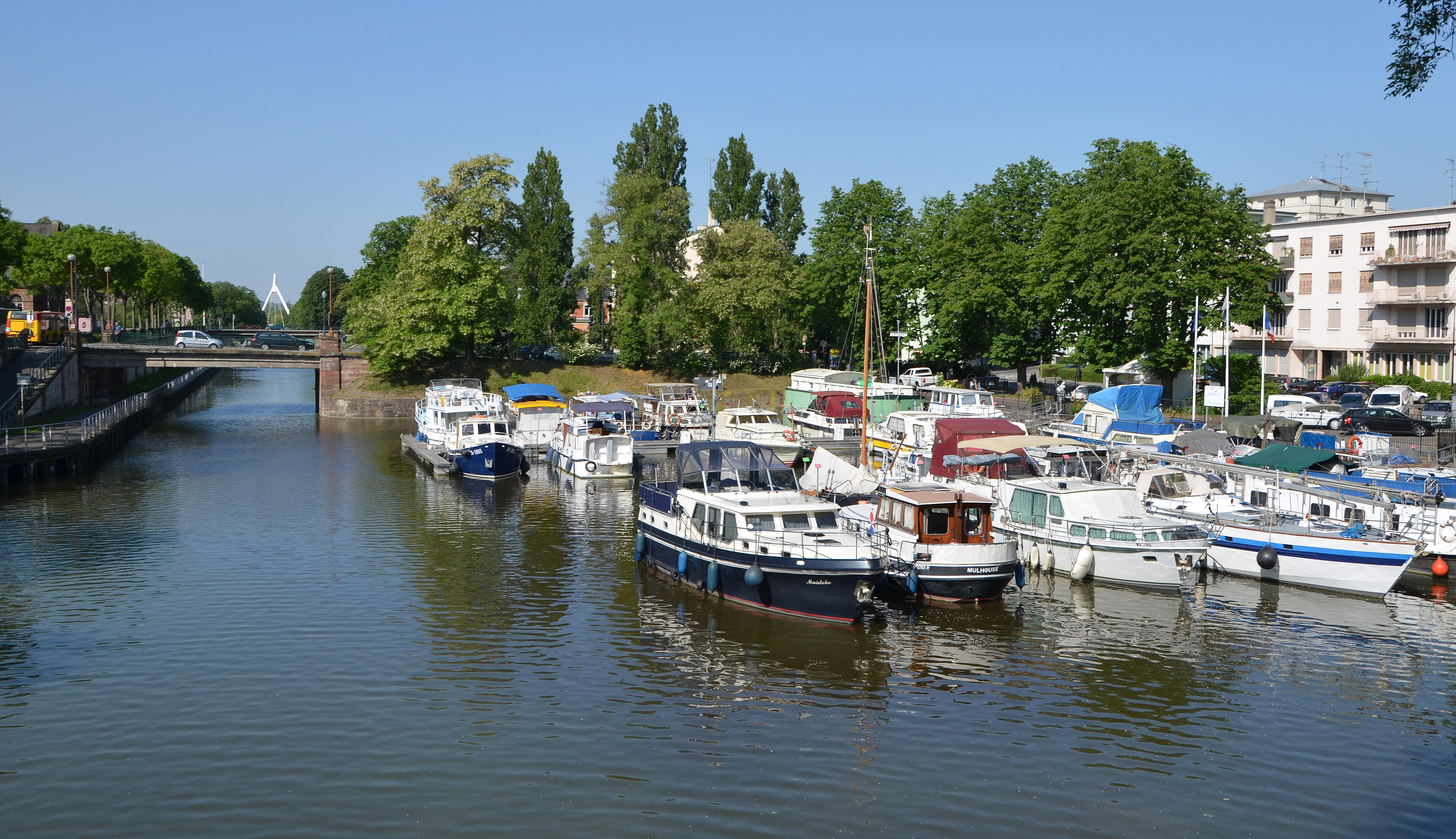 Port de plaisance de Mulhouse sur le canal du Rhône au Rhin, Haut-Rhin, Alsace, France